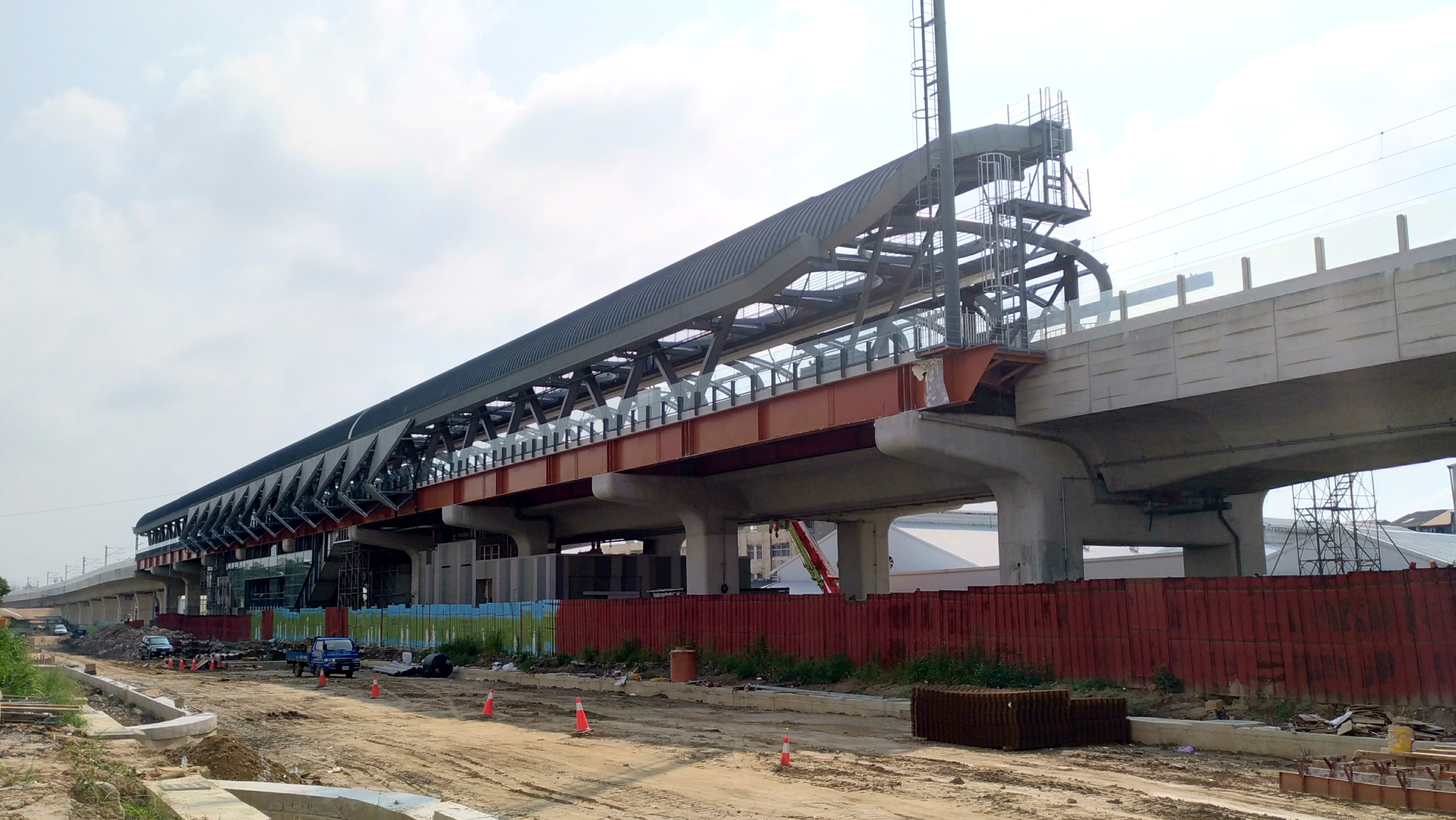 中文（台灣）: 台鐵栗林車站2017年9月工程